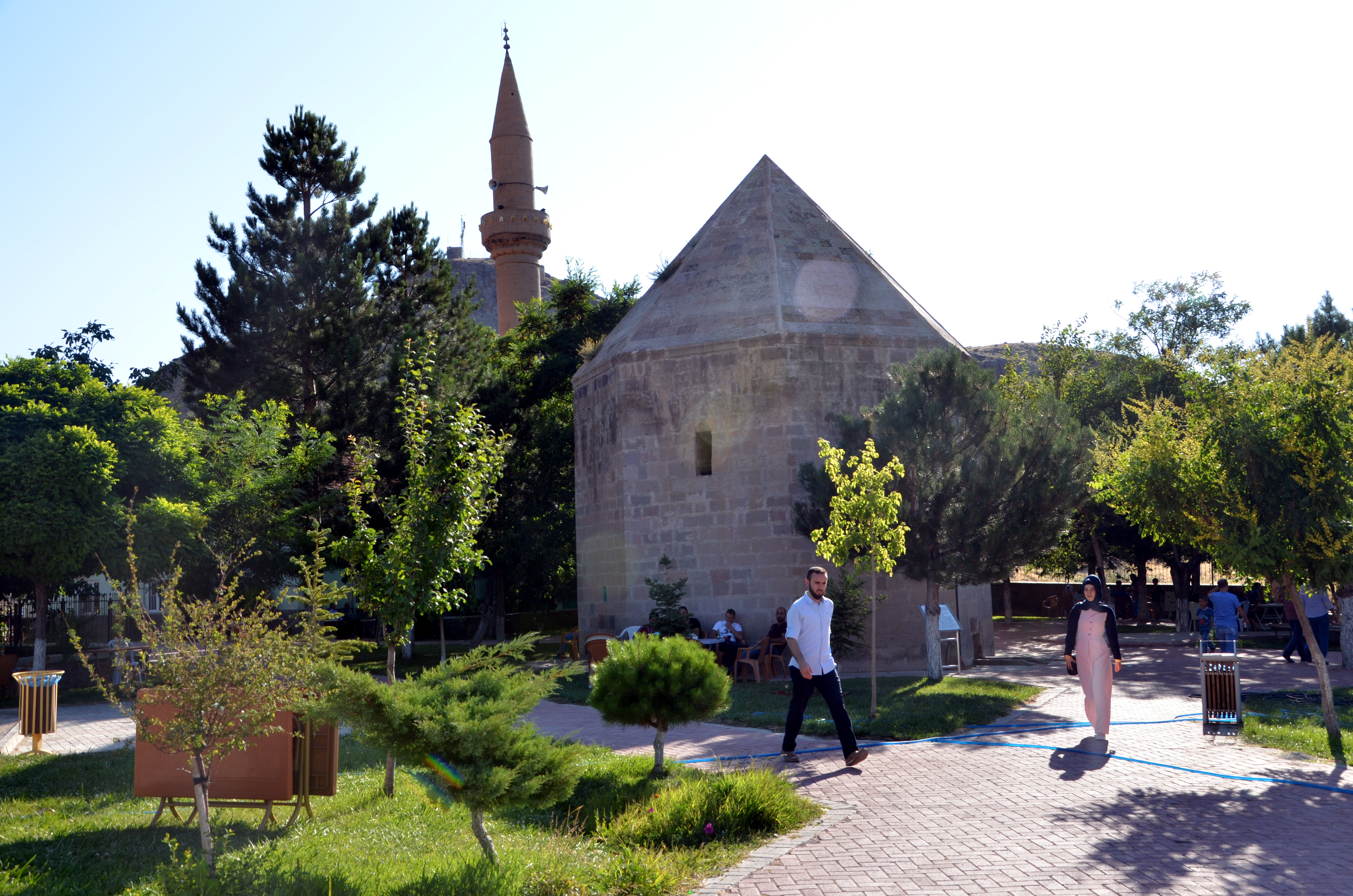 Dev Ali Türbesi. Yukarı develi/Develi/Kayseri